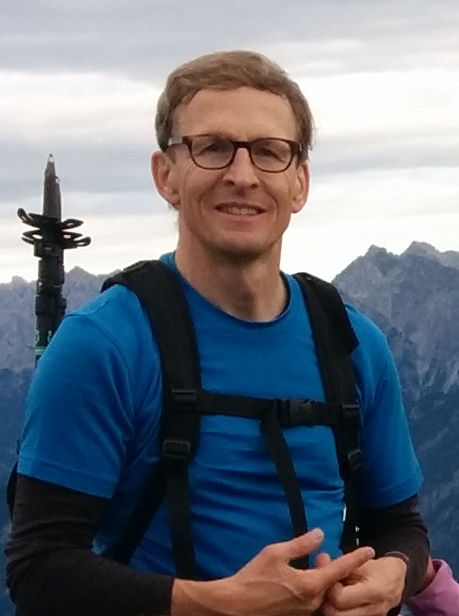 Zipse_beim_Wandern